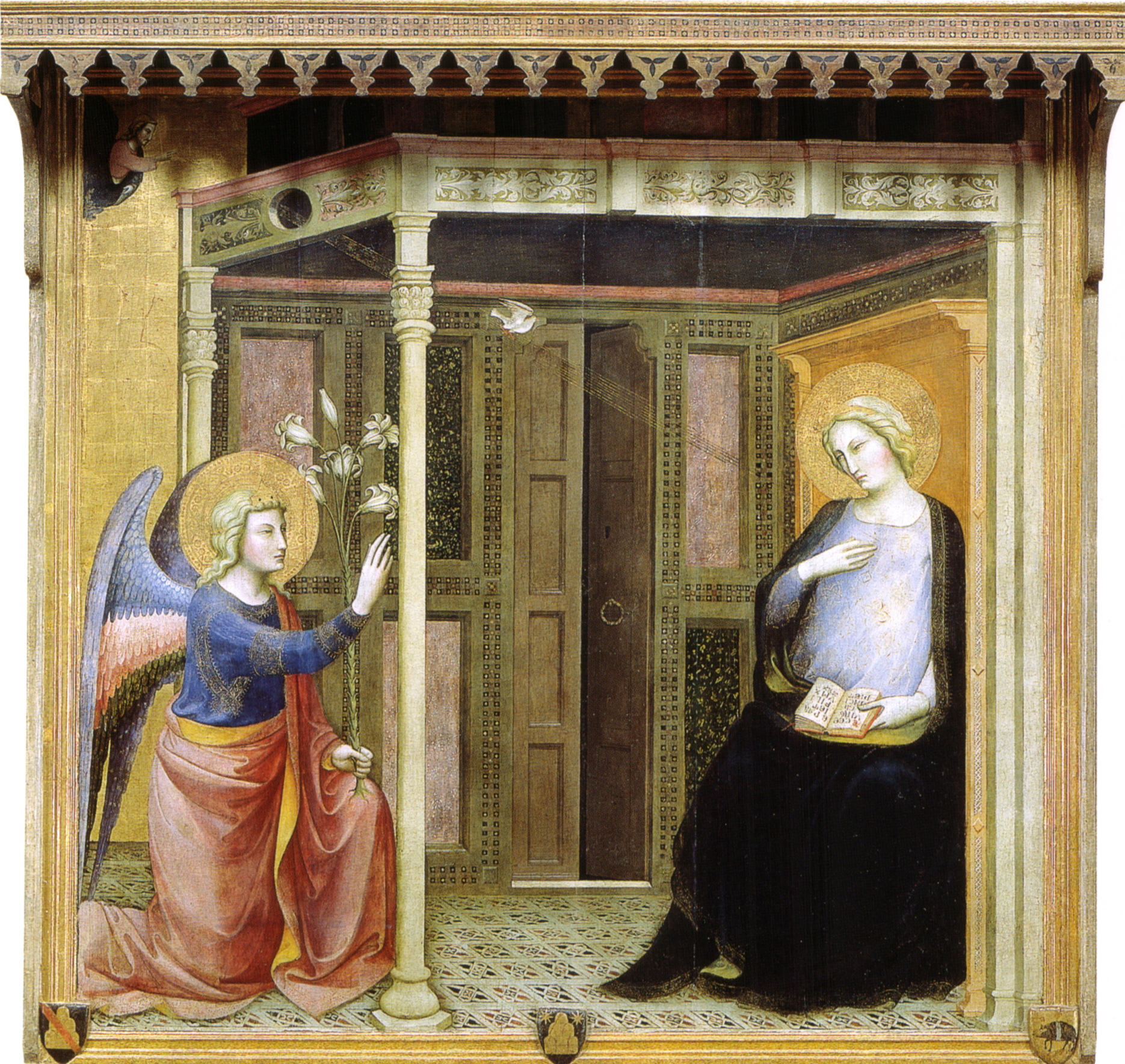 Maestro della madonna strauss, annunciazione, 1390s